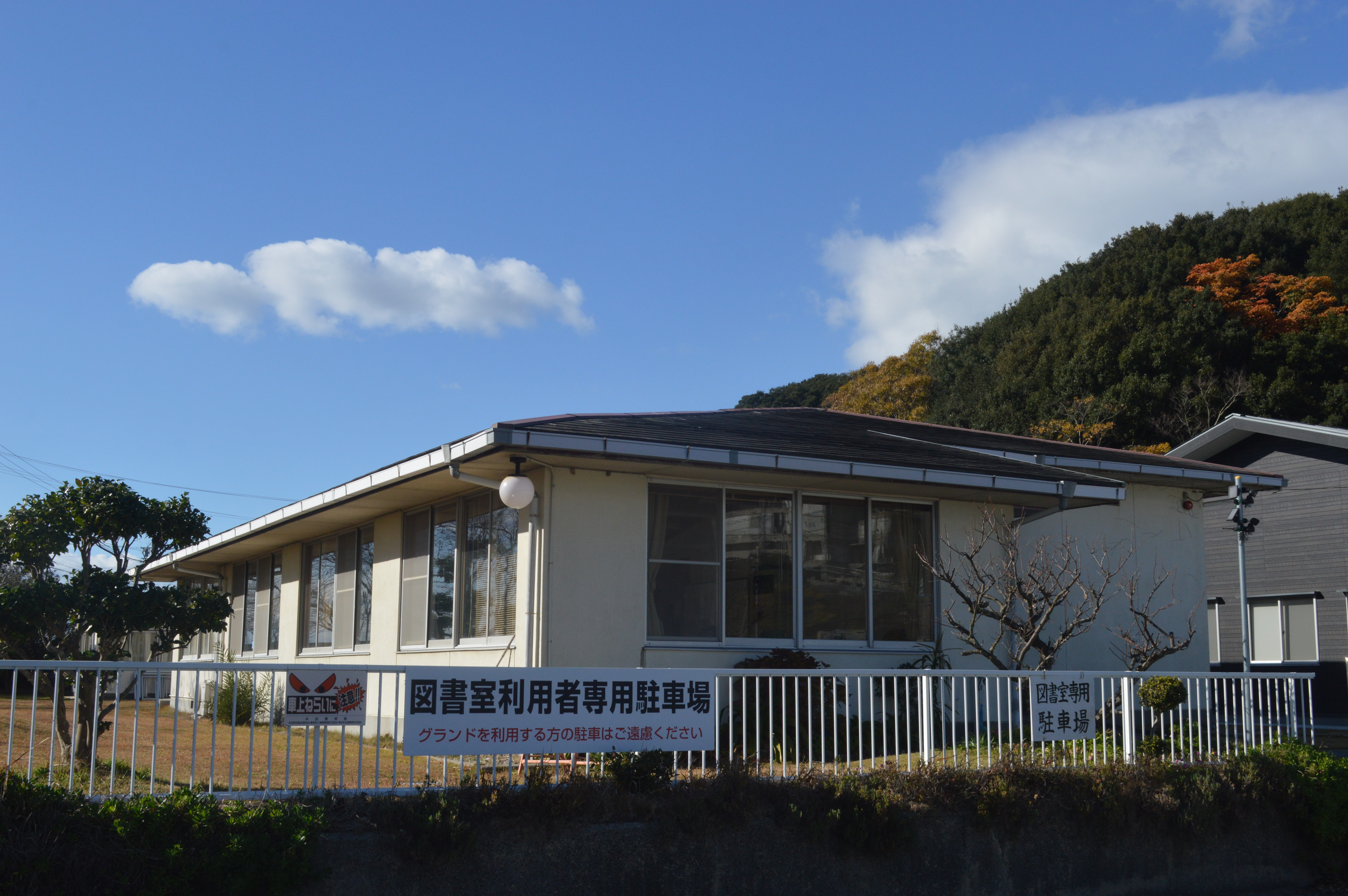 愛知県知多郡南知多町にある南知多町町民会館図書室。図書室の単独施設である。